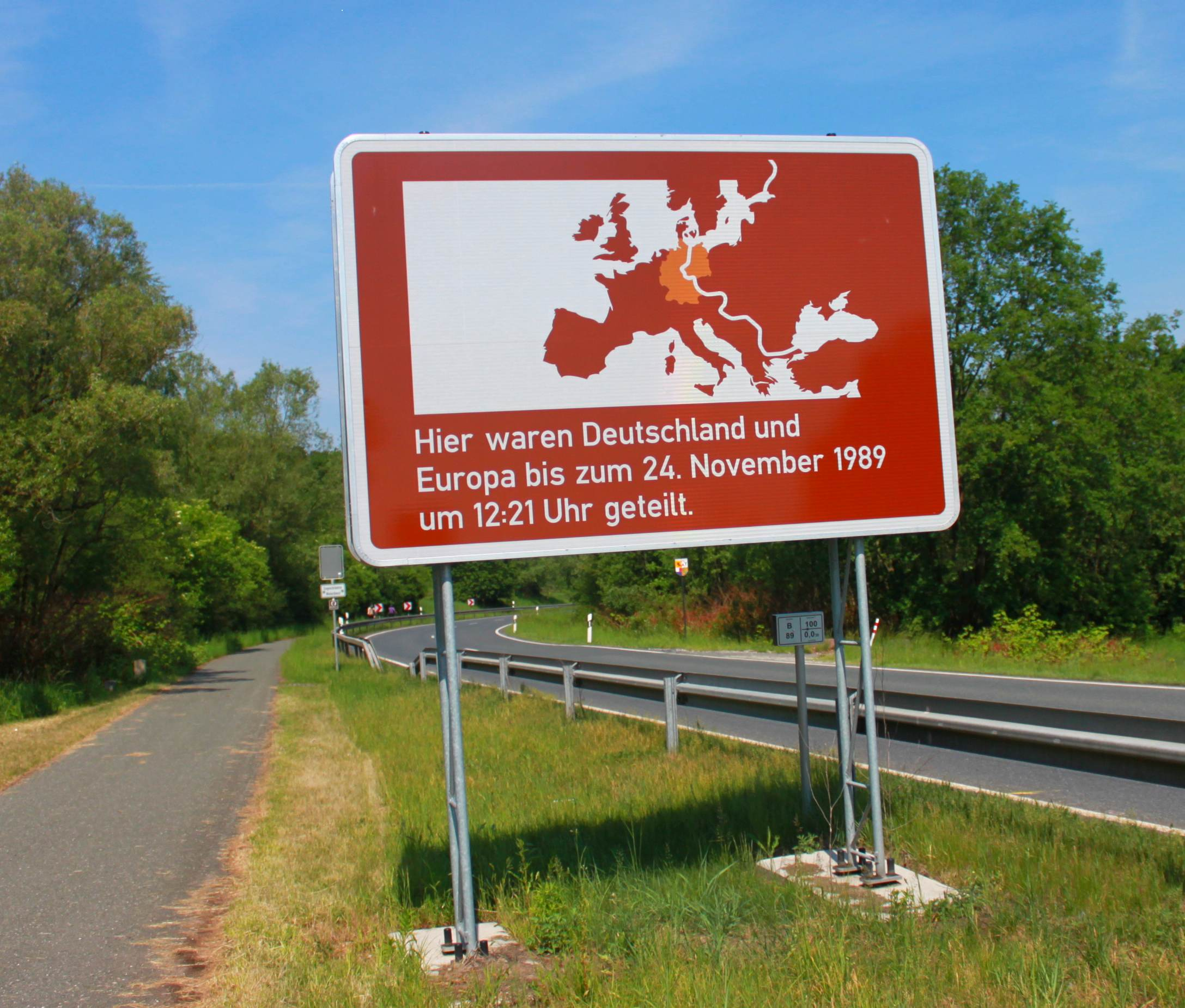 Die ehemalige innerdeutsche Grenze zwischen Neuhaus-Schierschnitz und Burggrub